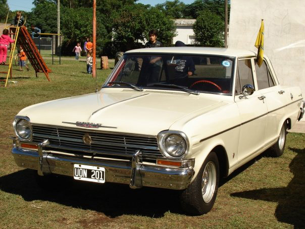 Chivo 400